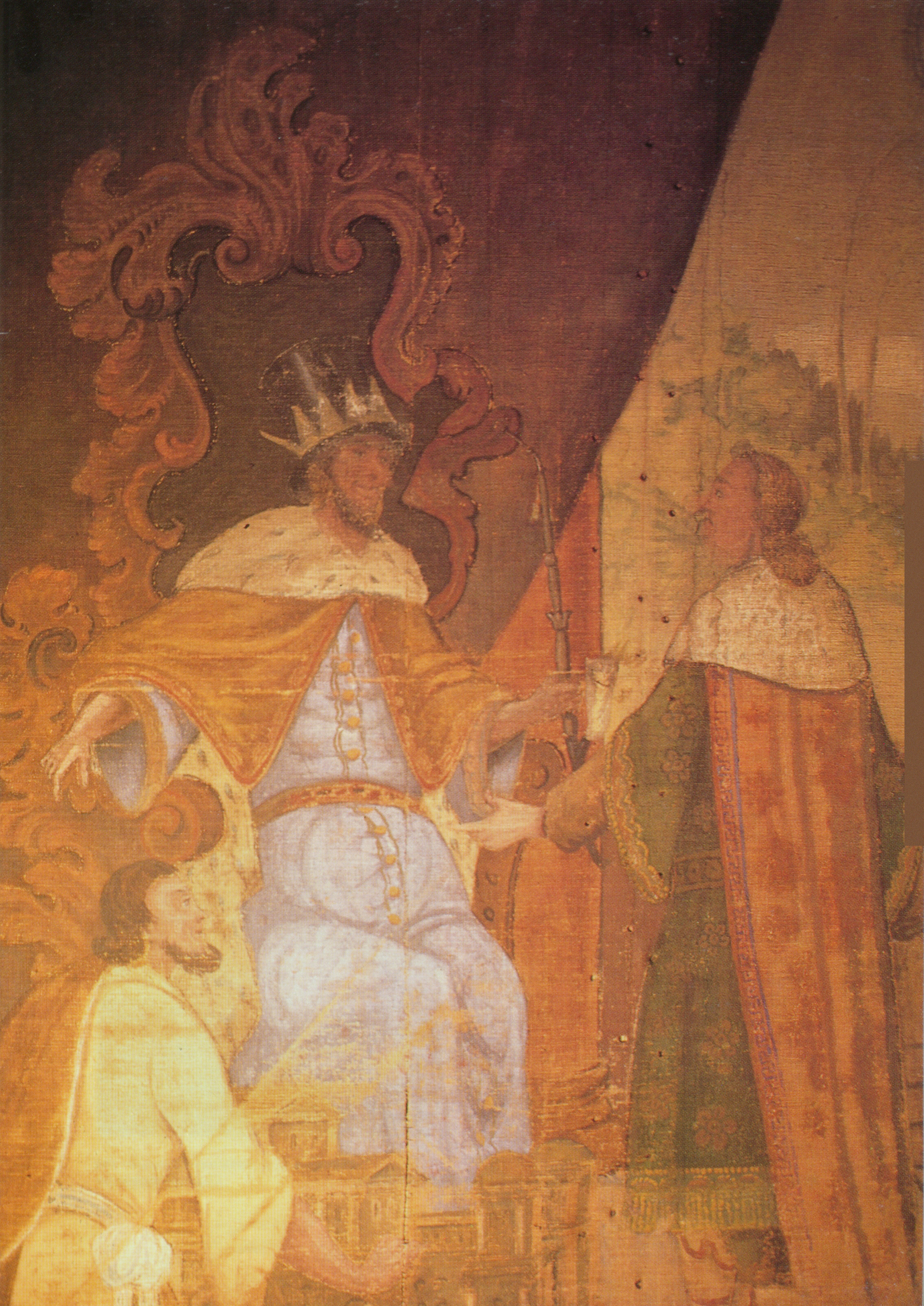 Wandmalerei im Salon des Schlosses Thor in Astenet, Belgien